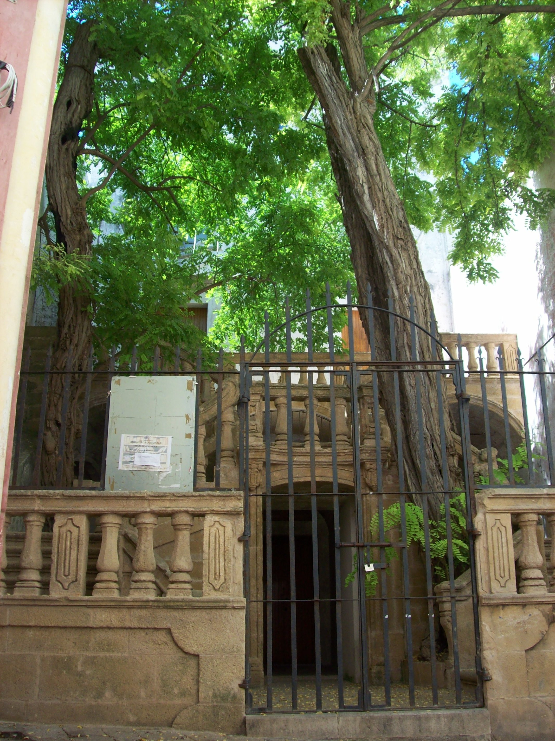 Gallipoli